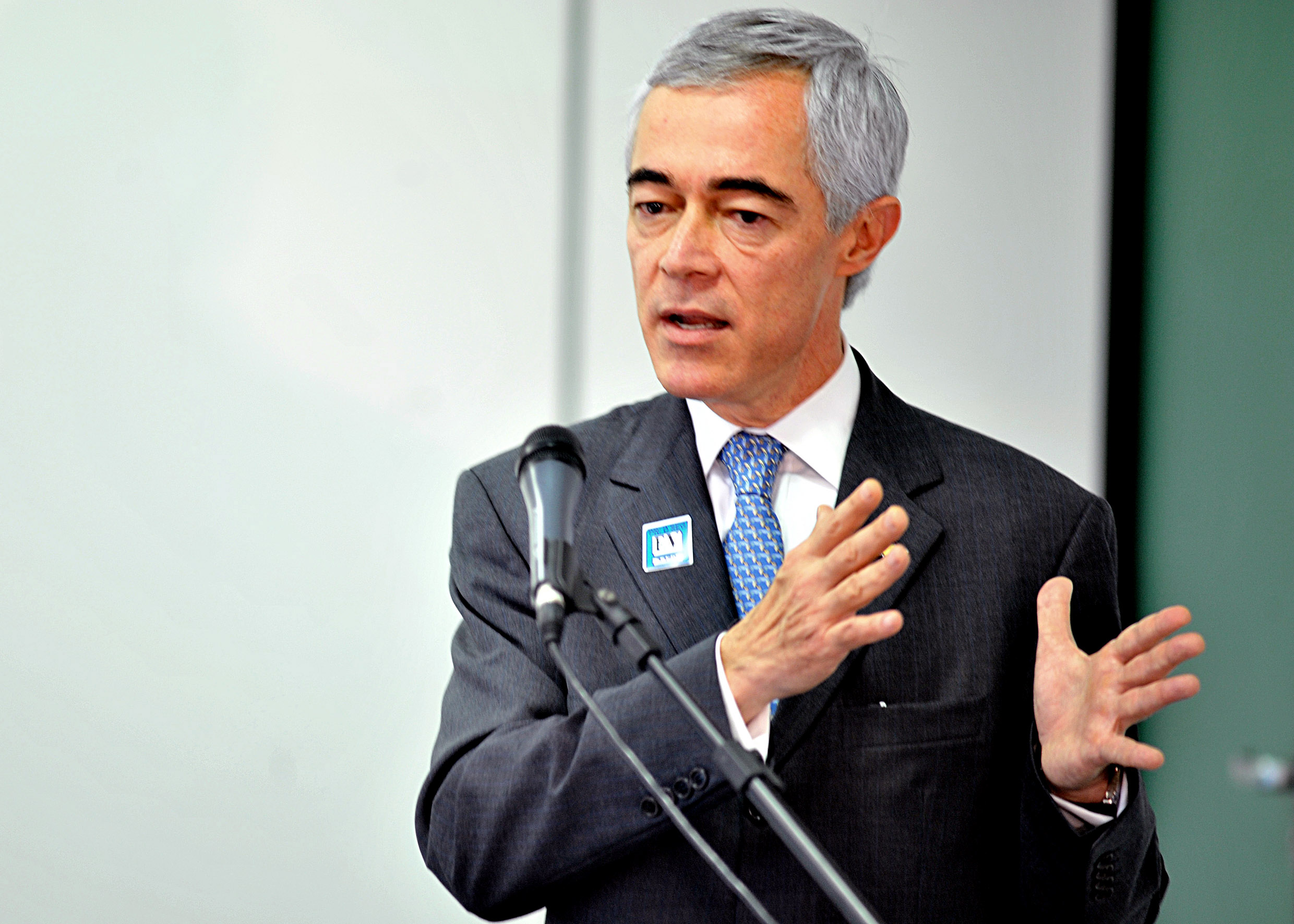 O presidente da General Motors do Brasil e Mercosul, Jaime Ardila, anuncia novos investimentos da empresa no país.